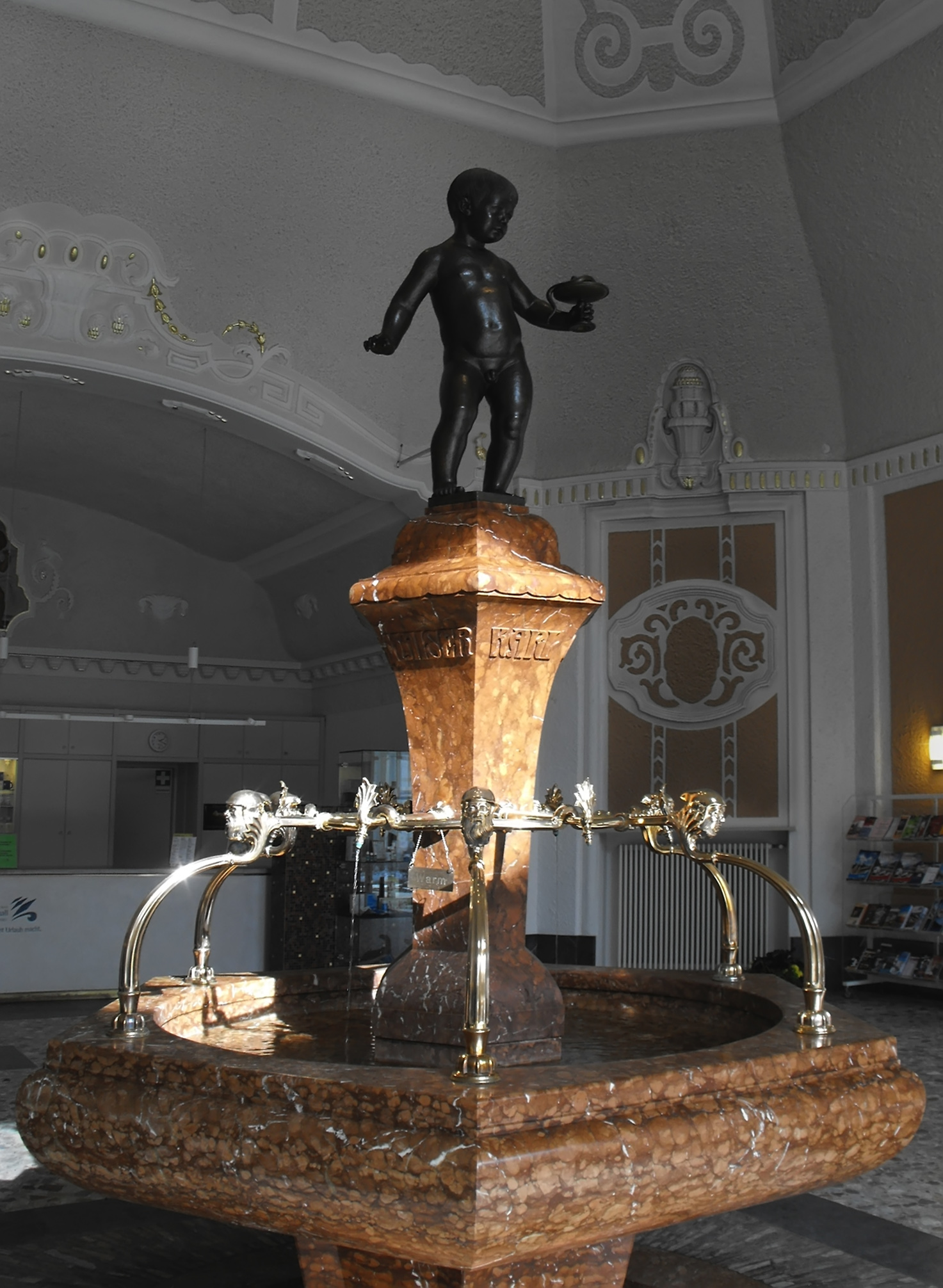 Die Kaiser Karl-Quelle in der Wandelhalle des Kurhauses von Bad Reichenhall